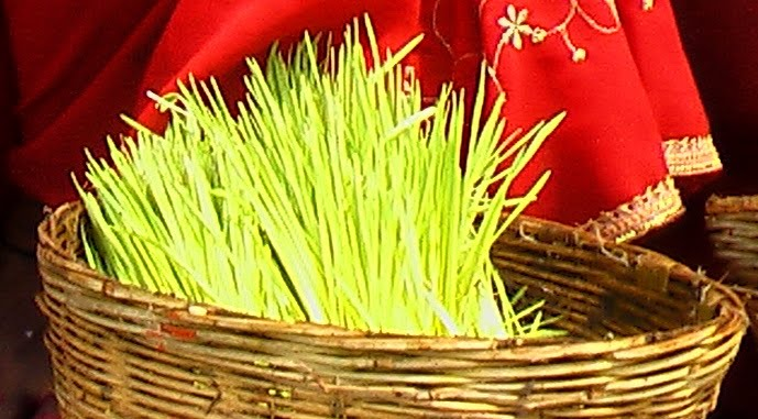 bhojli